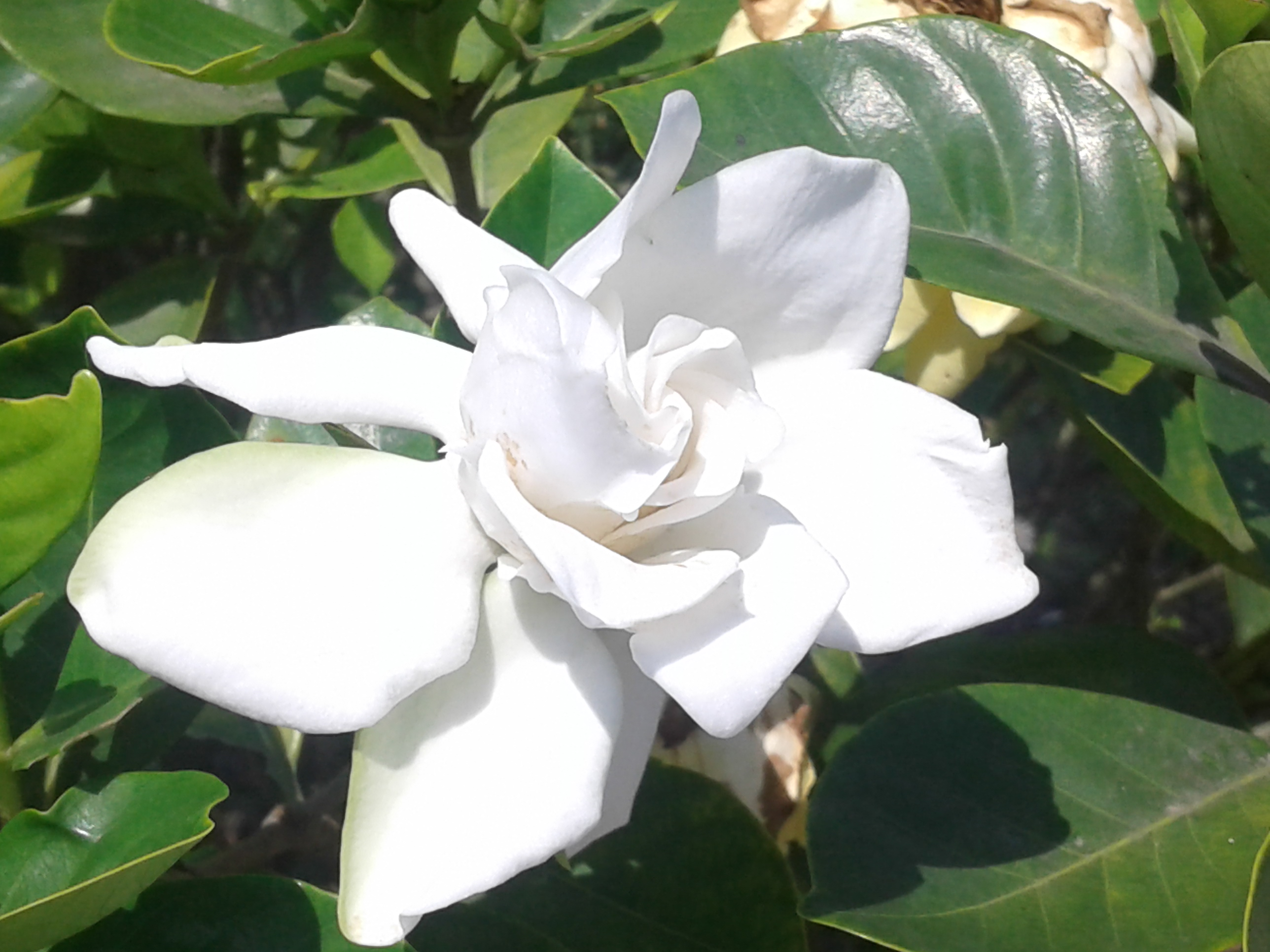 বেলি ফুল বাংলা নাম। মধ্য প্রাচ্যের এর নাম আরাবিয়ান জেসমিন।এটি দক্ষিন এশিয়ার দেশ গুলেতে বেশী দেখা যায়।